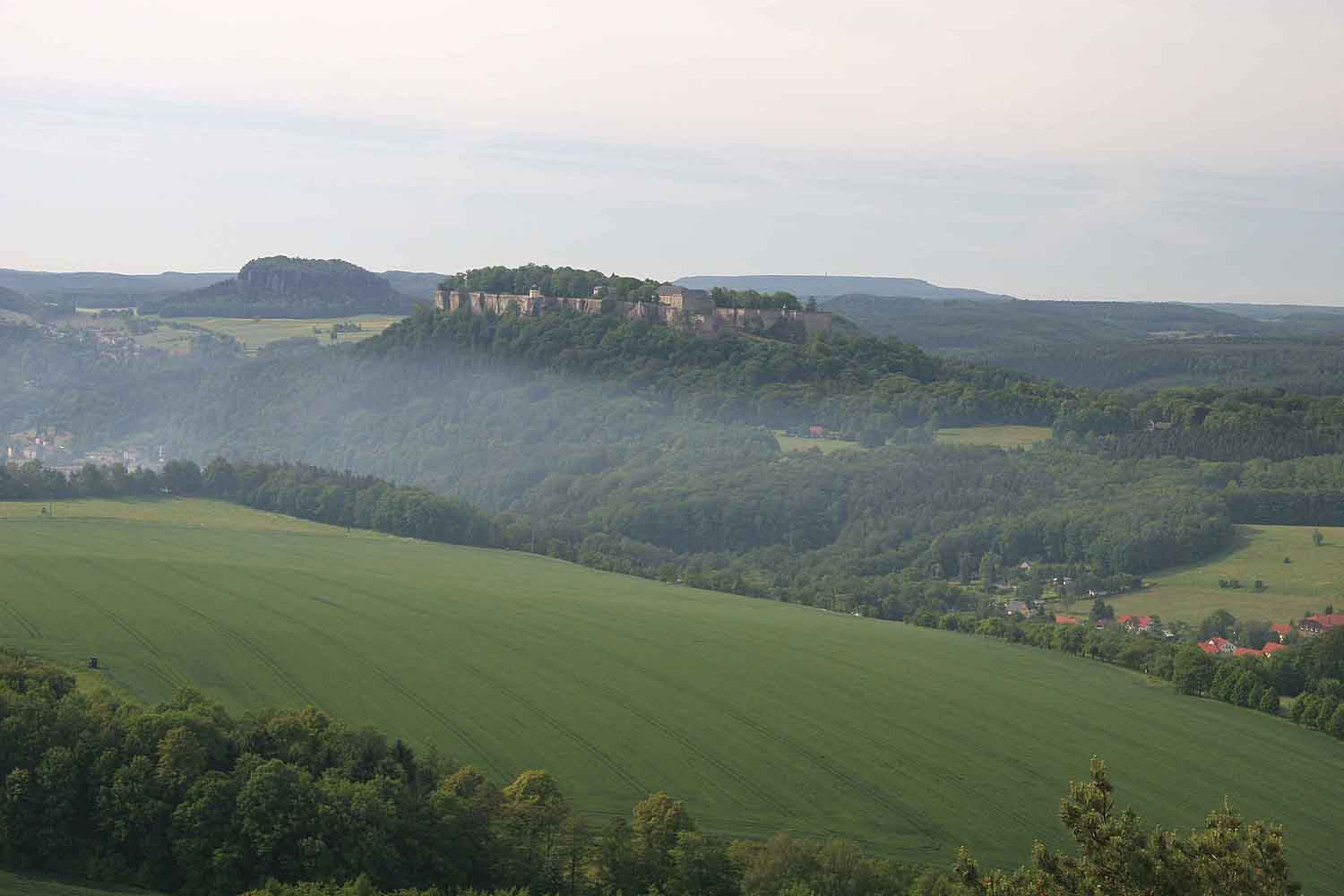 Stolová hora Kleiner Bärenstein - pohled na Konigstein a Pfaffenstein